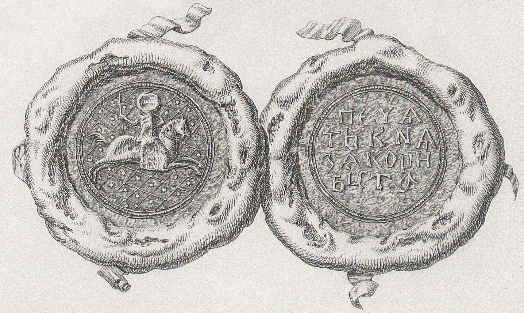 Беларуская (тарашкевіца): Пячаць князя Карыбута Альгердавіча з гербам Вялікага Княства Літоўскага Пагоняй (Pahonia)